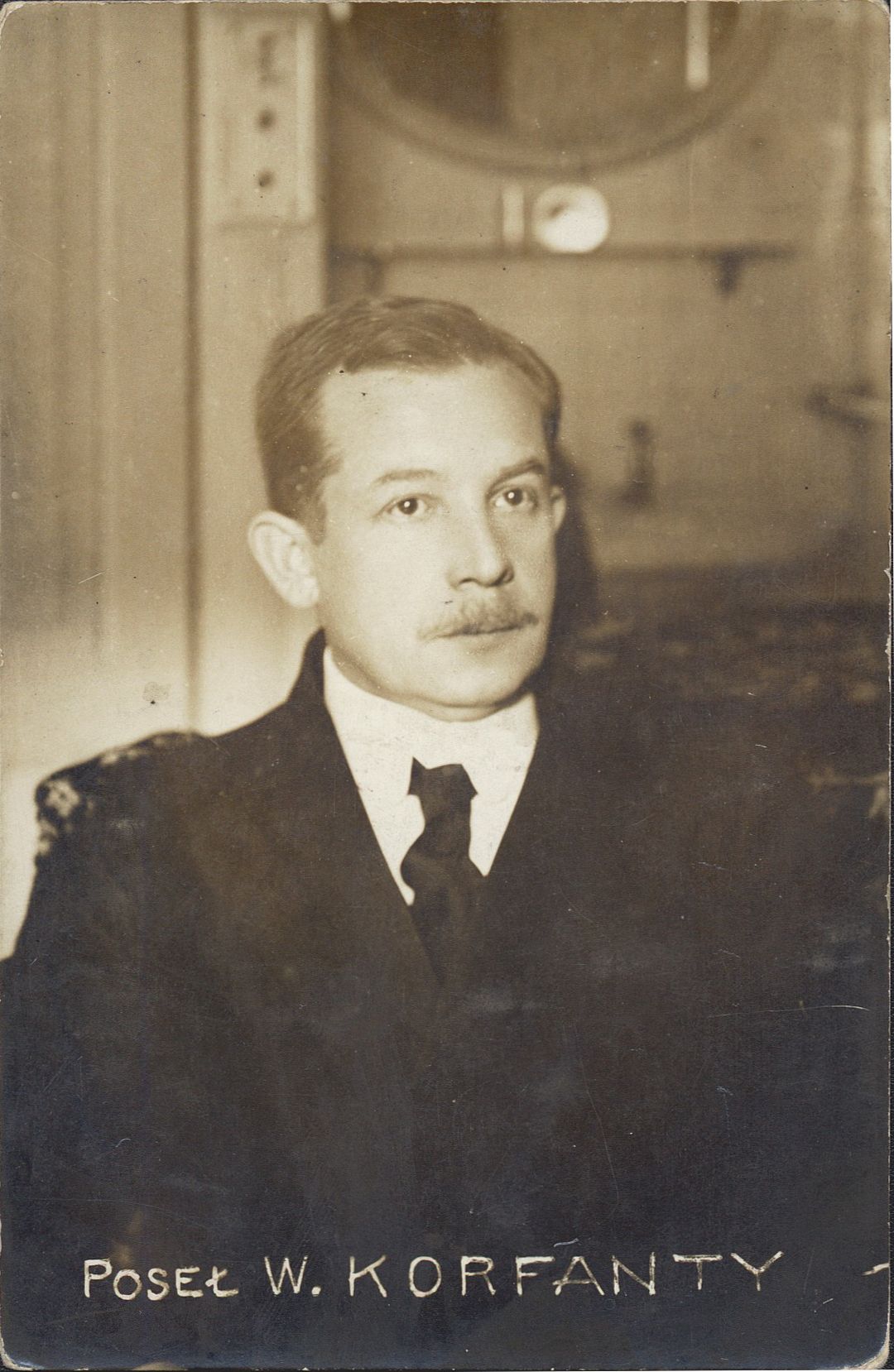 Poseł Wojciech Korfanty - pocztówka